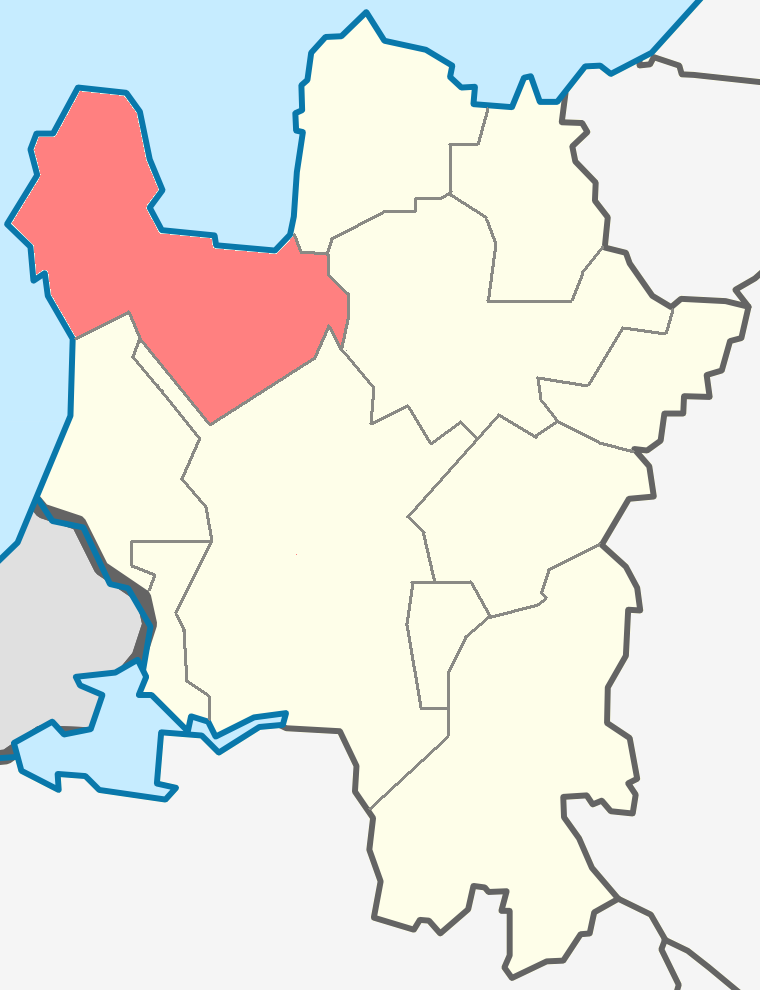 Усть-Лужское сельское поселение на карте Кингисеппского района